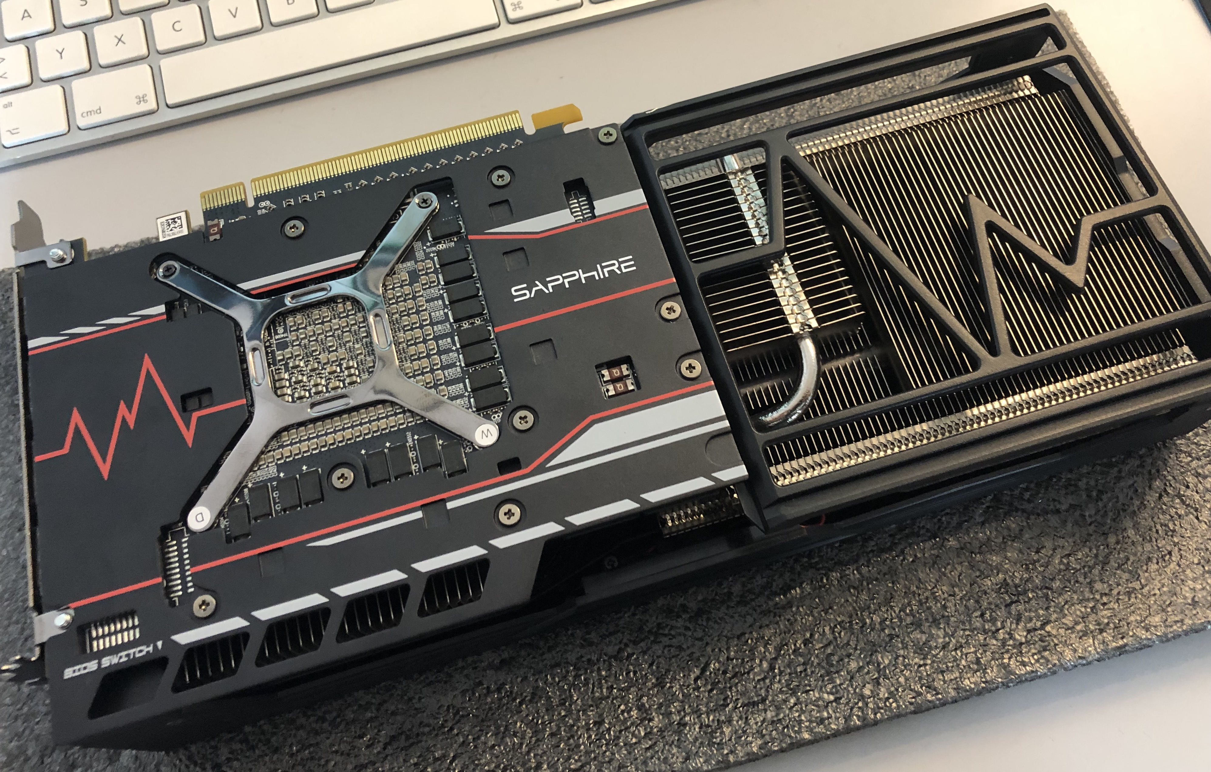 Sapphire RX Vega 56 Pulse (Rückseite)